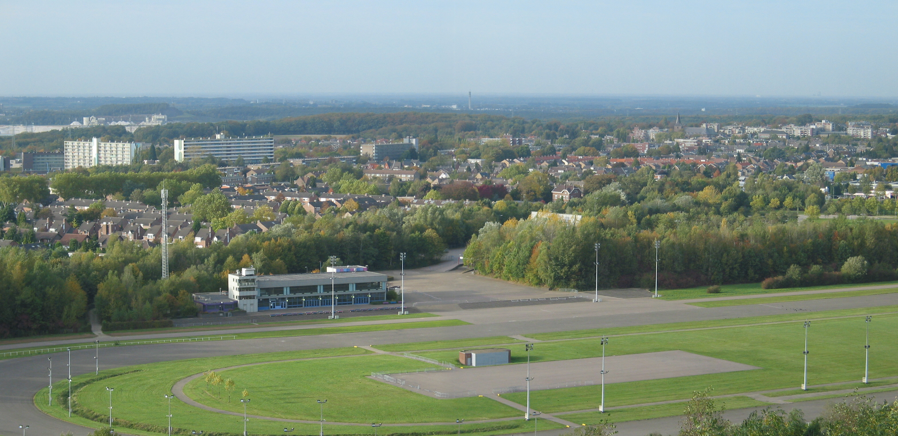 De kern Schaesberg gezien vanaf de Wilhelminaberg. De hoofdstraat is te herkennen aan de flats en de kerk. In het midden, vlak boven het projectiescherm van het auto-kino, is het voormalig huis van de mijn-opzichter te zien. Onderaan de foto is de voormalige draf en renbaan te zien waar het festival Pinkpop op wordt gehouden. Linksboven is de zilverzandgroeve Sigrano te zien. In het midden boven staat de communicatietoren van de AFCENT in Brunssum.